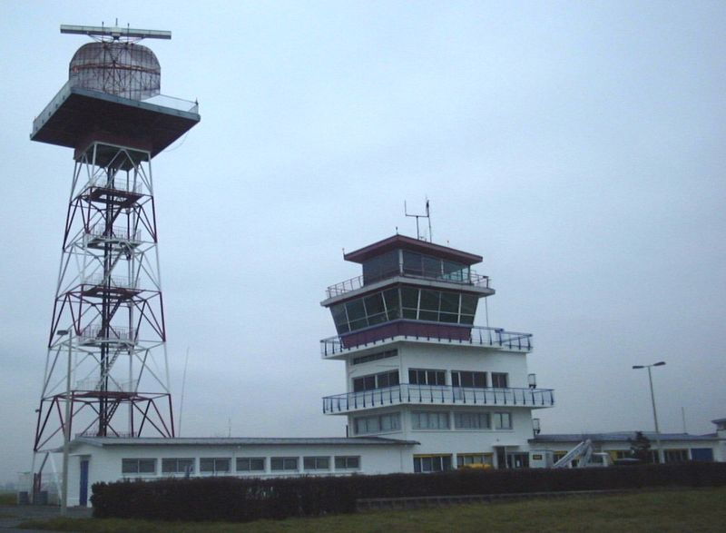 Ancienne tour de controle de Orly, avec le radar TA23 à coté, aujourd'hui démonté.